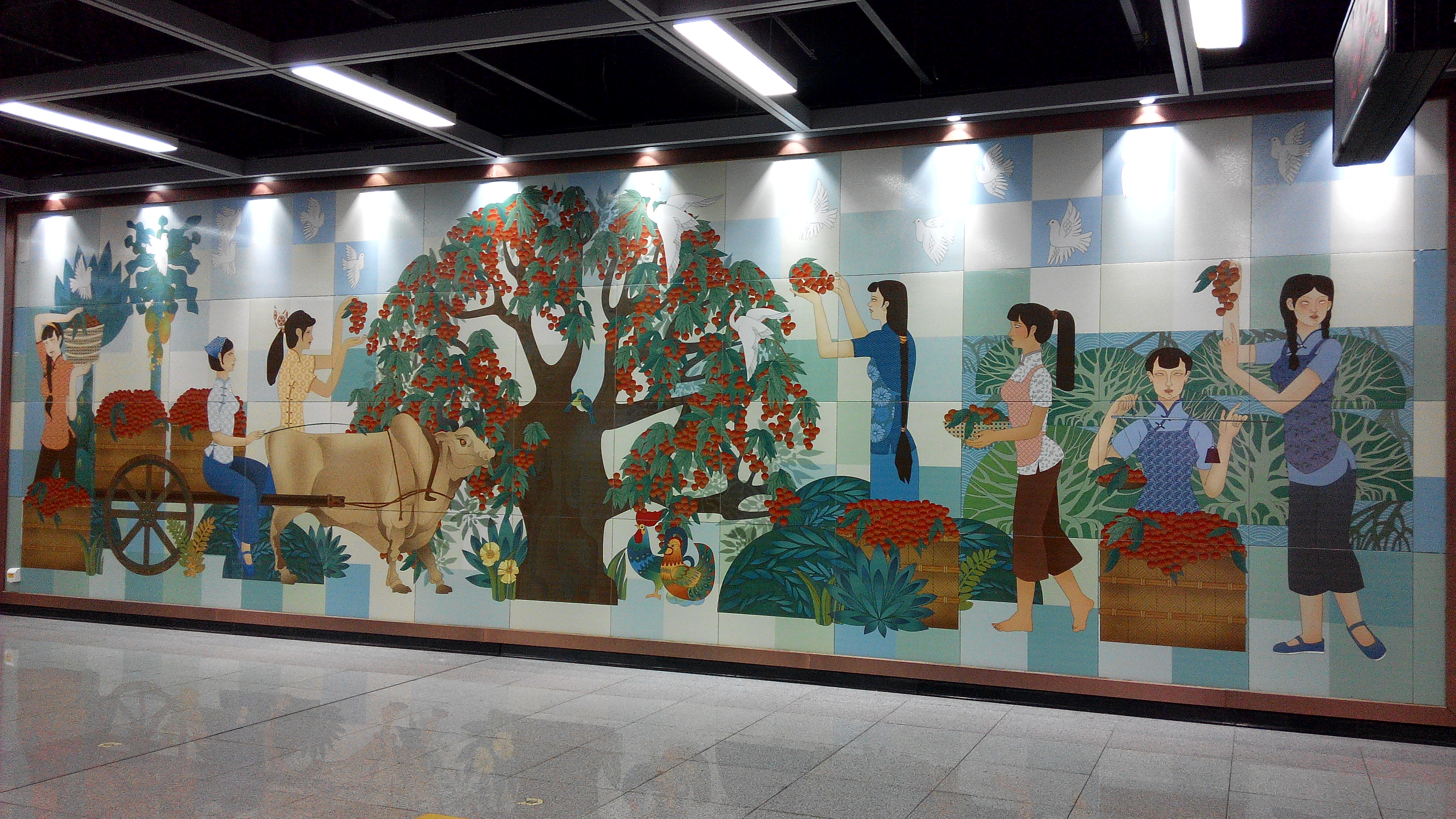 深圳地铁11号线 南山站站厅艺术墙